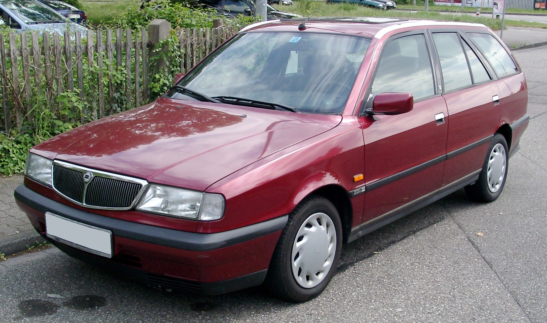 Lancia Dedra Station-Wagon